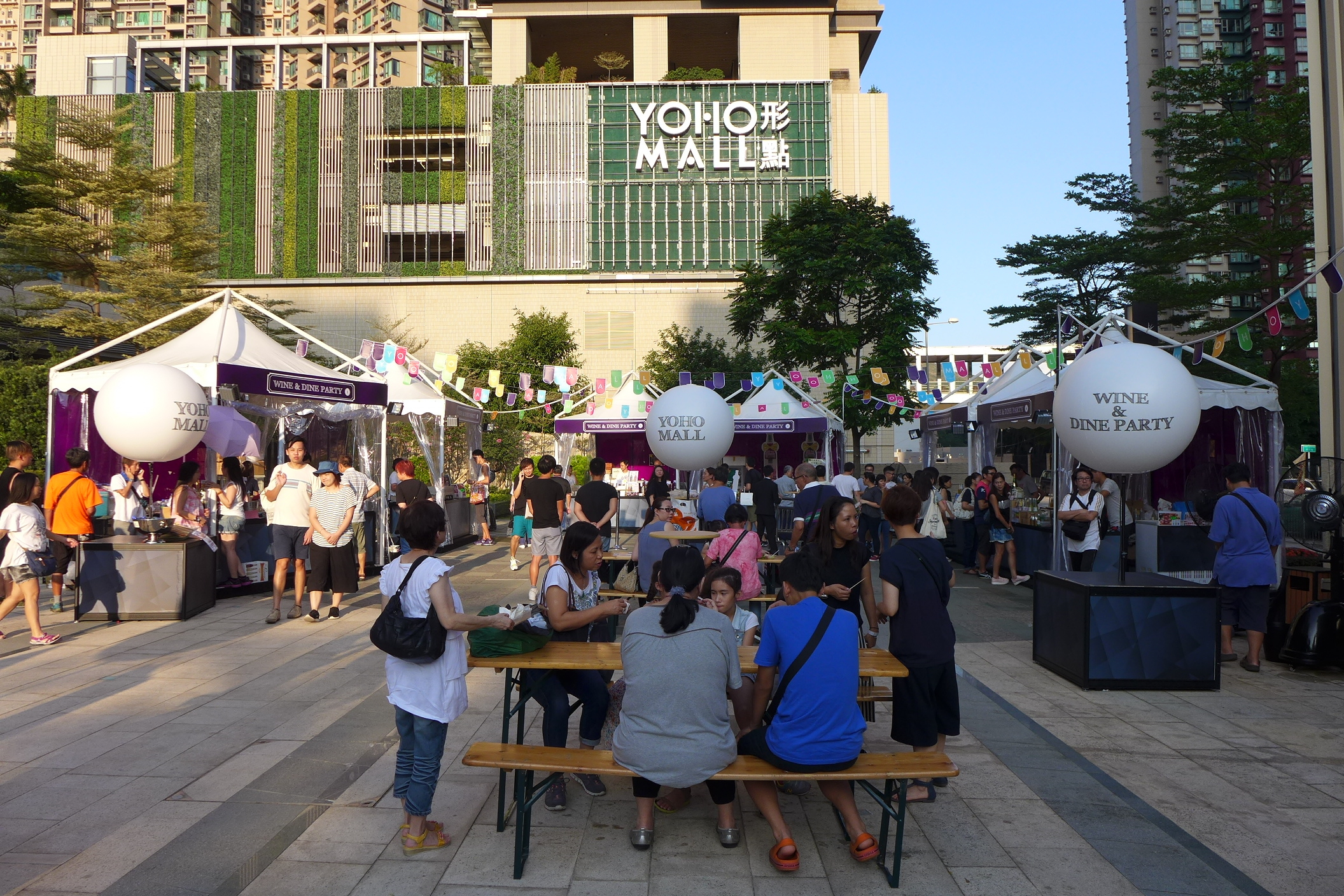 YOHO Mall Wine & Dine Party